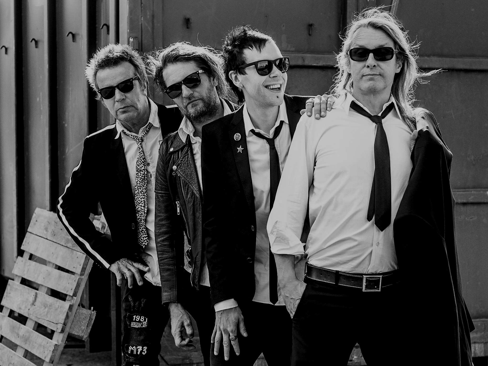 Tumppi Varonen & Problems 2019. Ajankohtainen kuva bändistä.